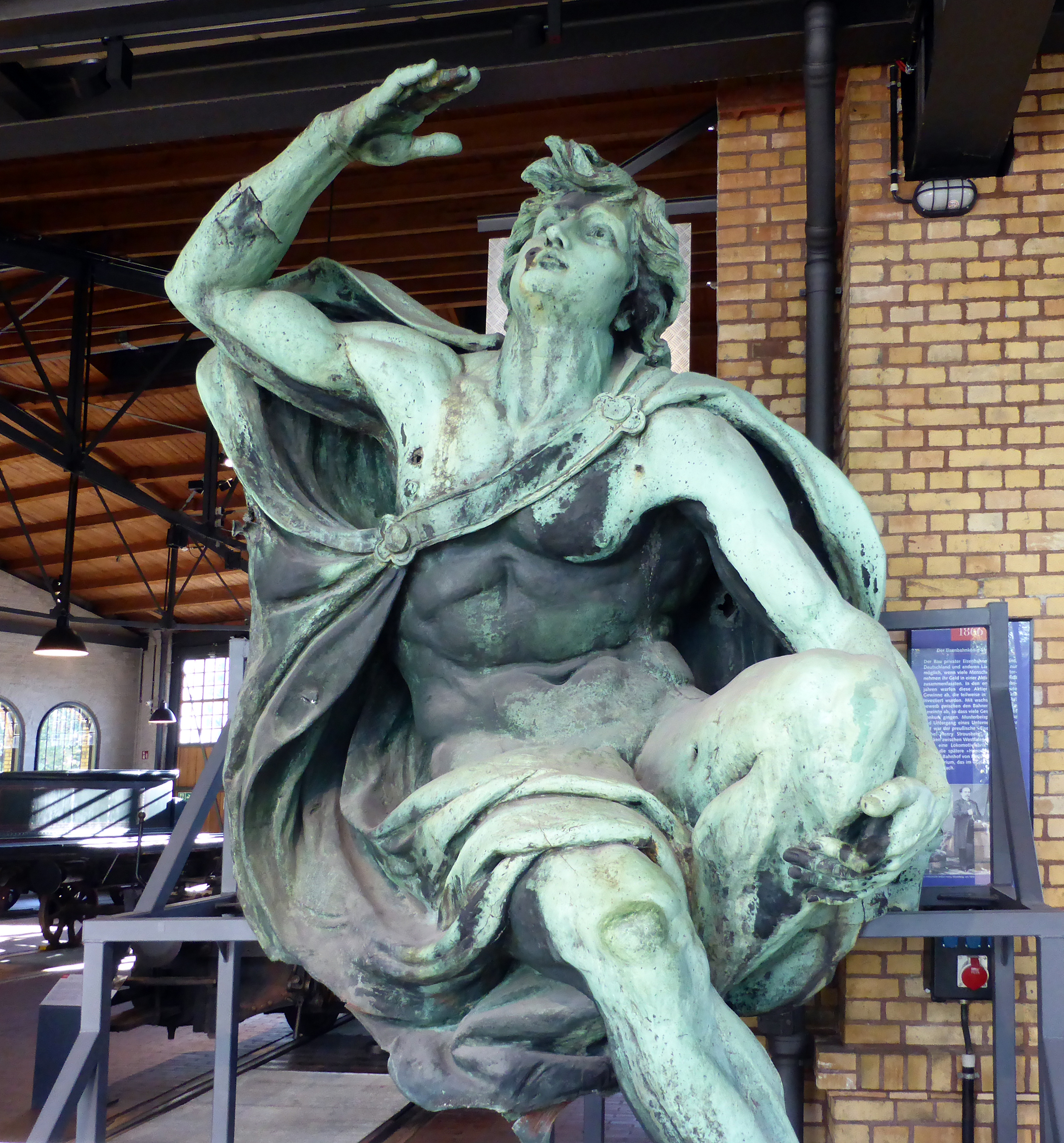 Figurengruppe Tag und Nacht. Galvanoplastik aus Kupfer vom Bildhauer Ludwig Brunow von 1880. Standen auf dem Anhalter Bahnhof (Berlin). Heute ausgestellt im Deutschen Technikmuseum Berlin. Wikipedianische KulTour am 10. Oktober 2015 in der Ausstellung des Museums.